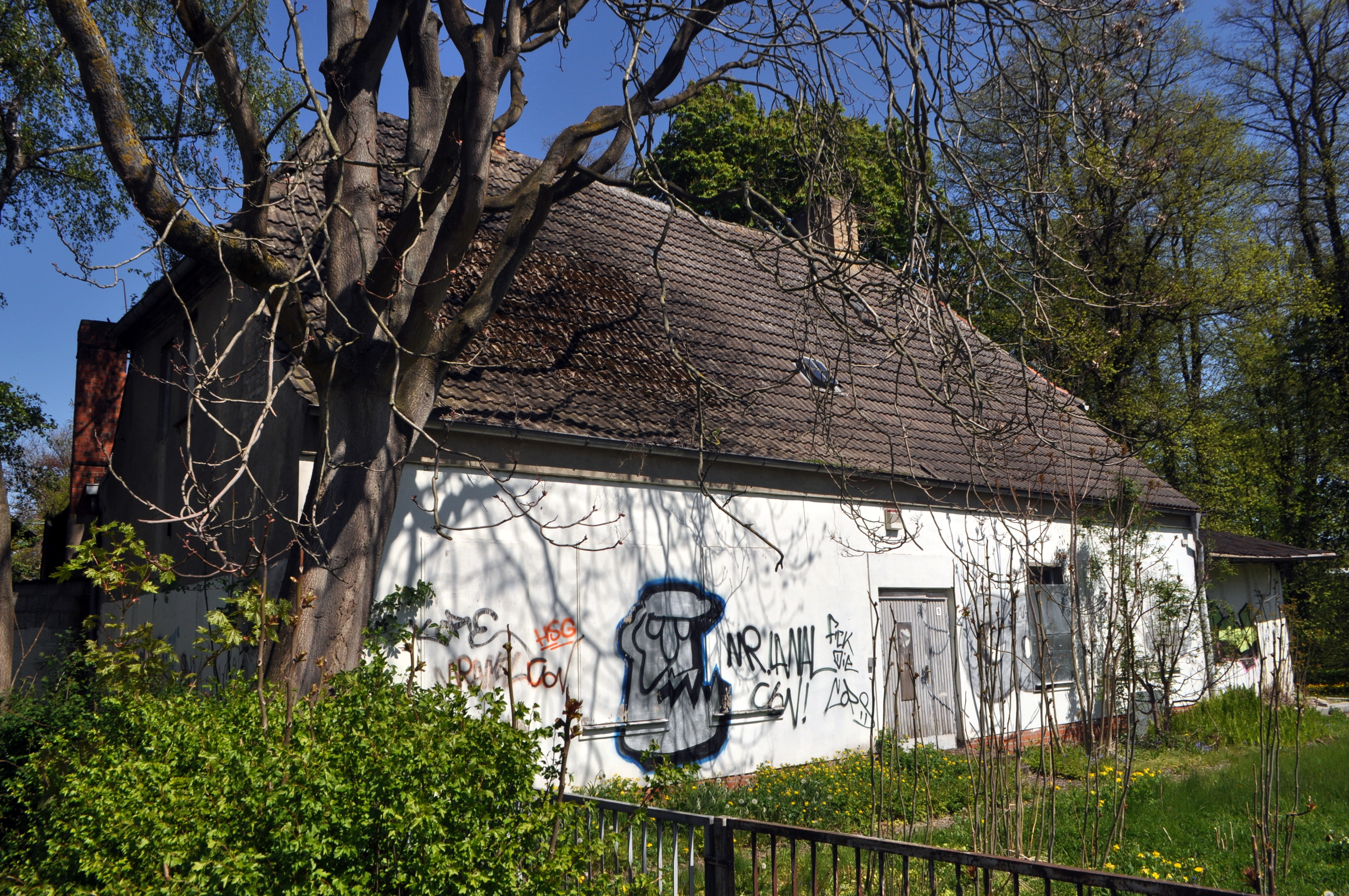 Das Bild zeigt Haus und Grundstück Knieperdamm 5 in Stralsund am 7. Mai 2016. Das im Jahr 1850 errichtete, unter Denkmalschutz stehende, zuletzt verfallene Haus wurde am 11. November 2017 abgerissen. Auf dem Grundstück steht eine etwa 300 Jahre alte Eibe, der wahrscheinlich älteste Baum Stralsunds.